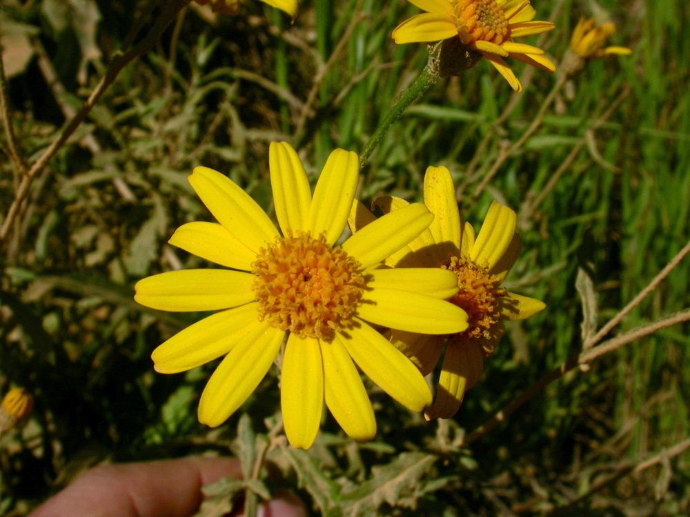 Senecio haloragis